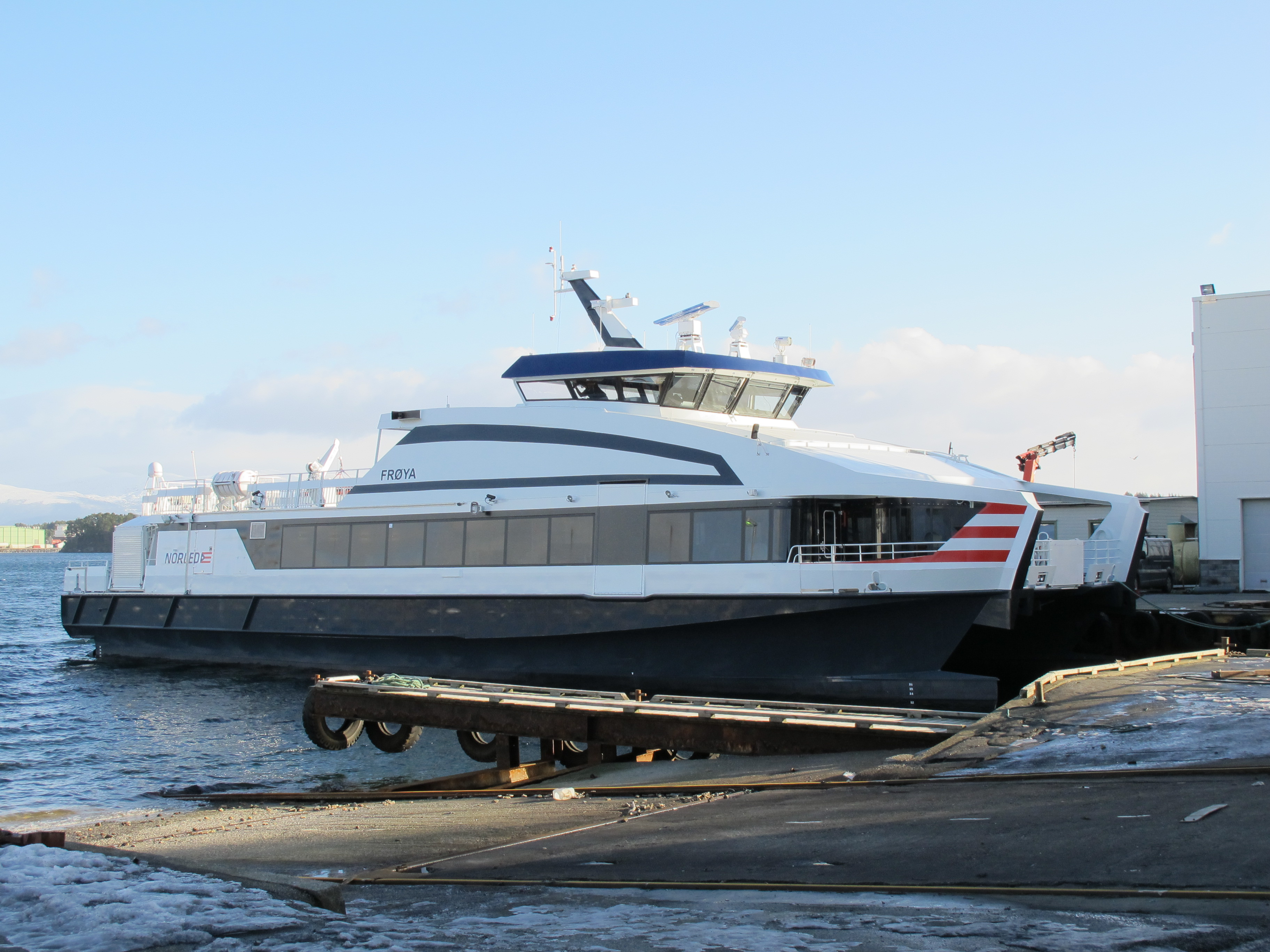 MS Frøya ved Oma Slipp, Stord Foto Harald Sætre